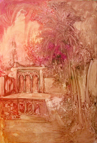 Medina Azahara, Casa de los Visires.Serie "Al Islam" de Pedro Roque Hidalgo